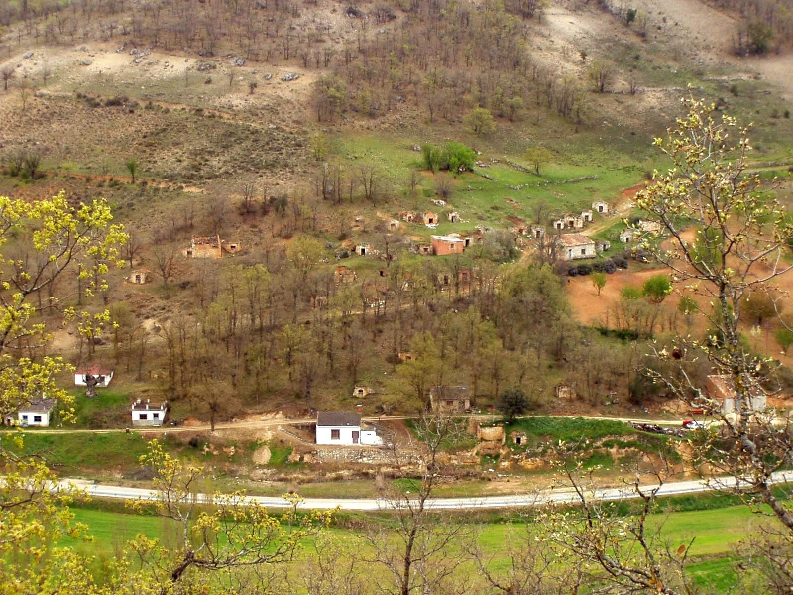 Corrales de Duero. Valladolid. Bodegas